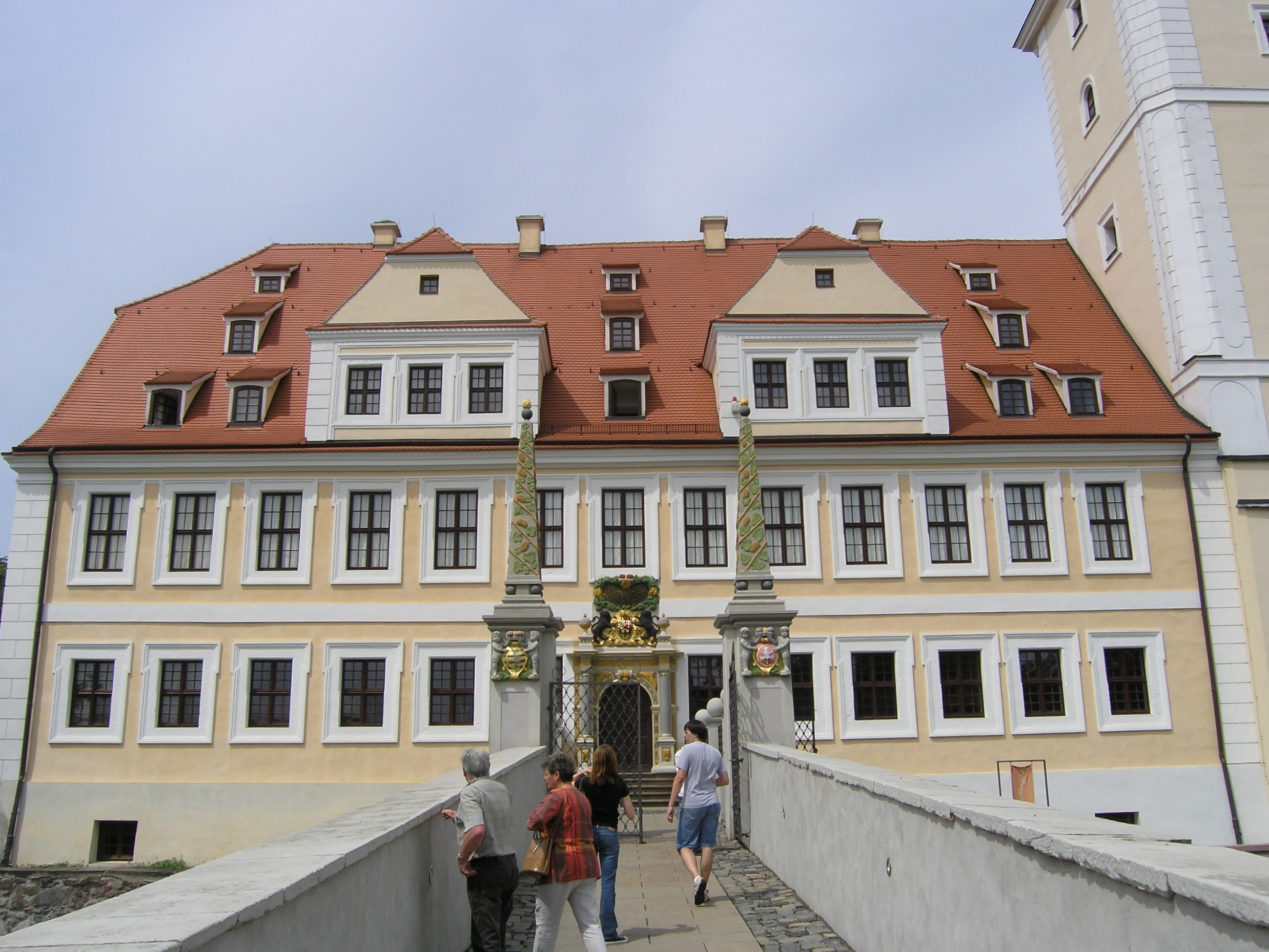 Herrenhaus von Schloss Delitzsch